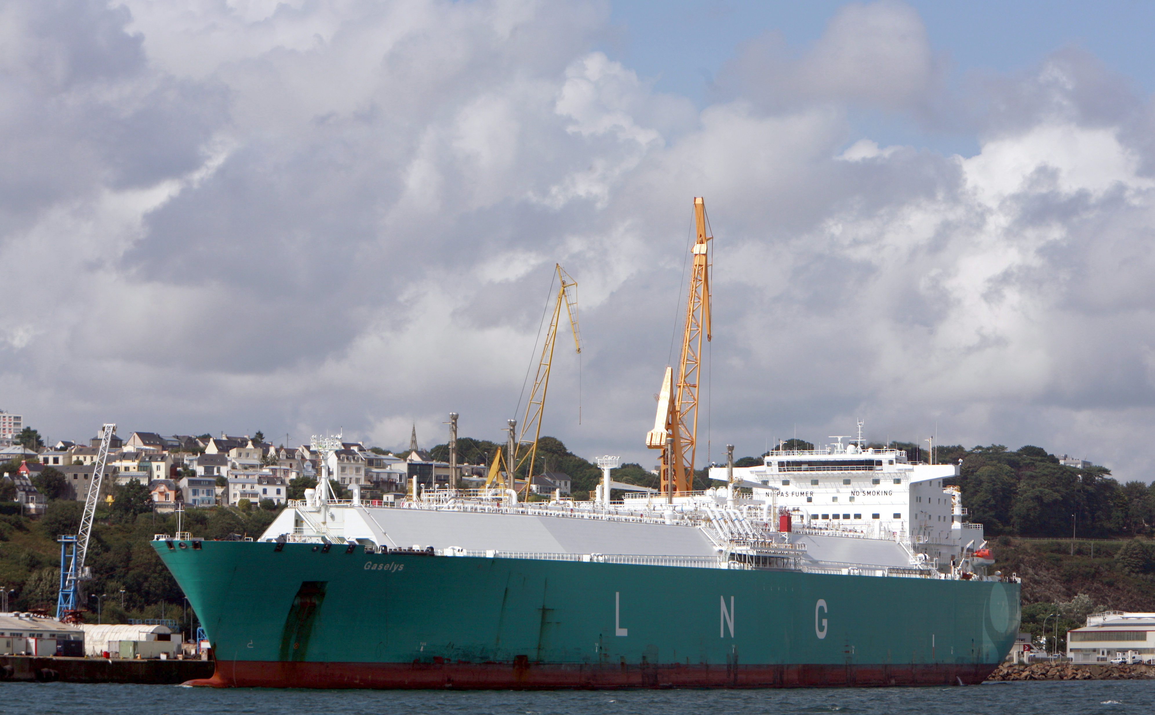 Gaz de France LNG carrier Gaselys in Brest harbour